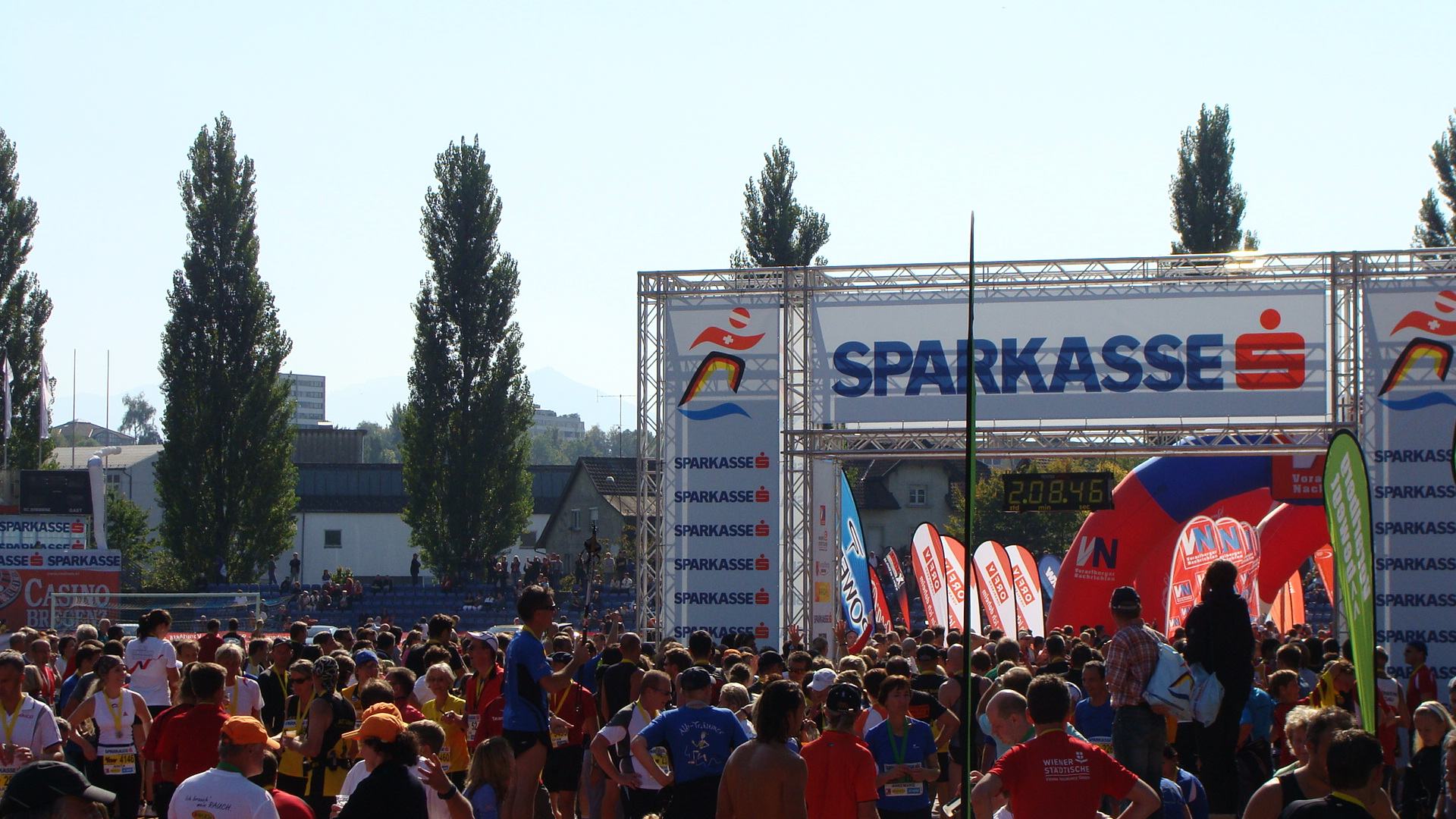 Sparkasse-Marathon im Dreiländereck, 2009